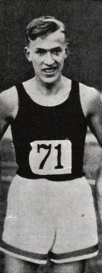 Lennart Strandberg från en bild i Svenska dagbladets årsbok 1934 tillgänglig via projekt Runeberg.